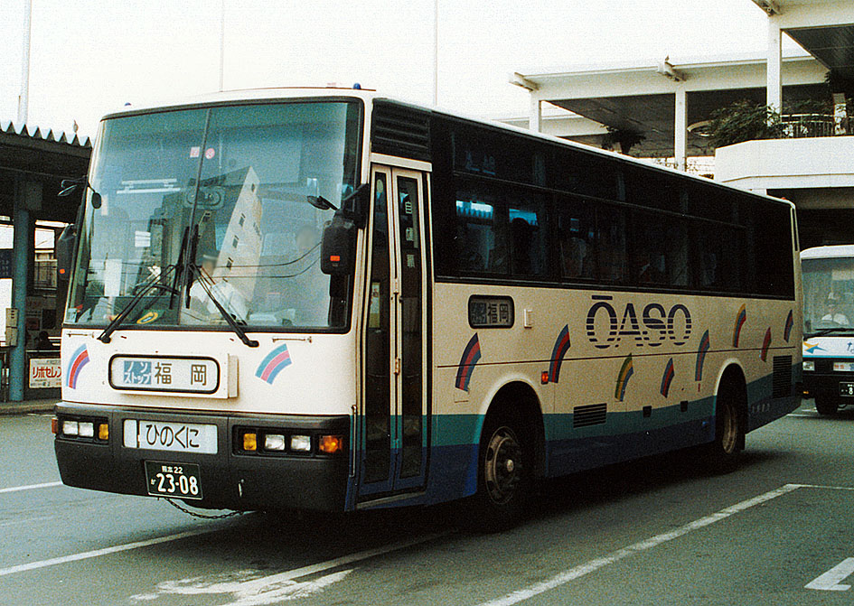 九州産業交通 高速バス「ひのくに号」（「おおあそ号」カラー）